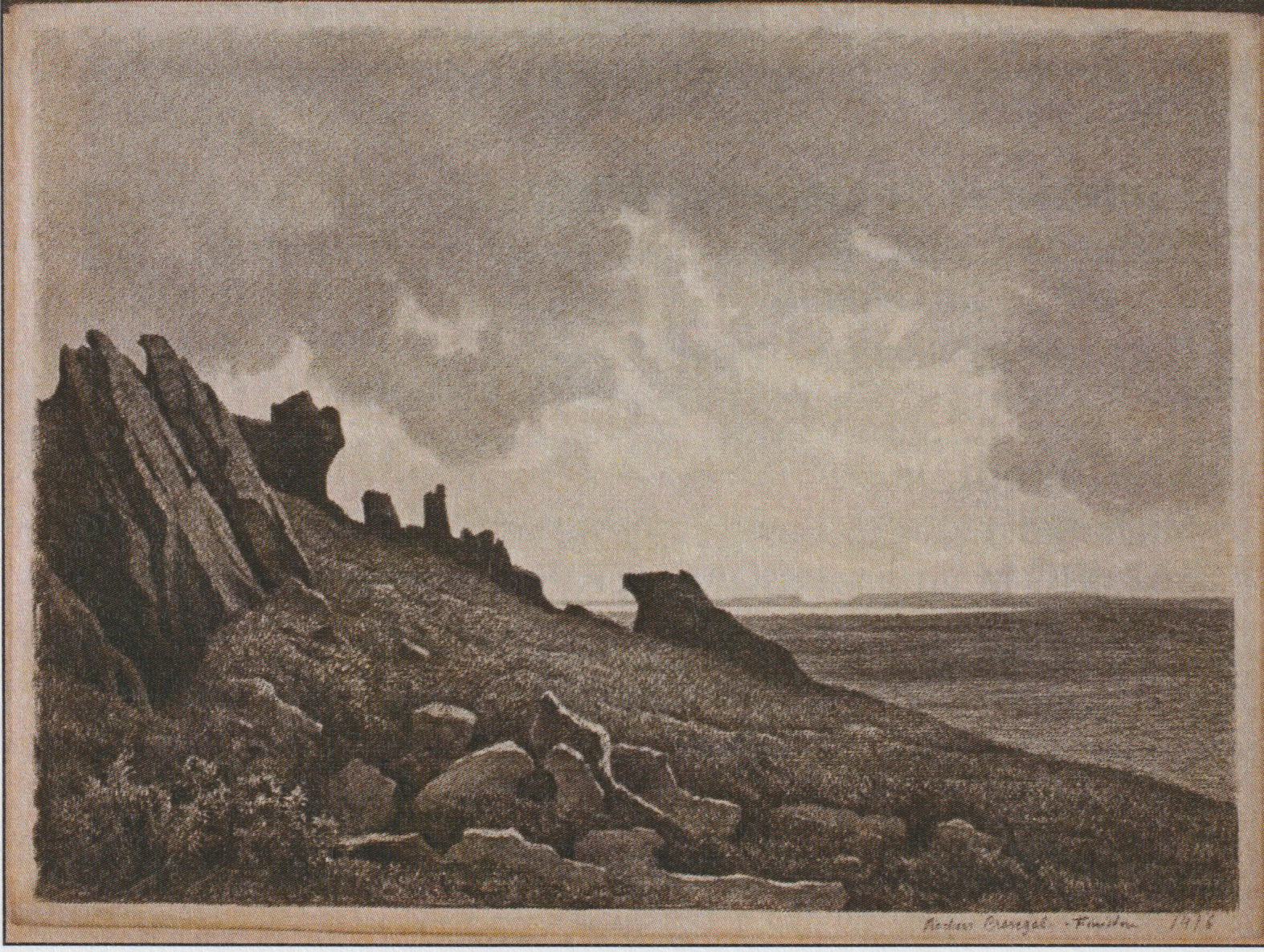 Vue de la rade de Brest et du marais St Michel depuis le Roc'h Trevezel. Fusain préparatoire de l'aquarelle conservée dans la collection du vicomte de Coëtlosuet. Vers 1875. Conservé actuellement dans les collections du Musée des Beaux arts de Metz.